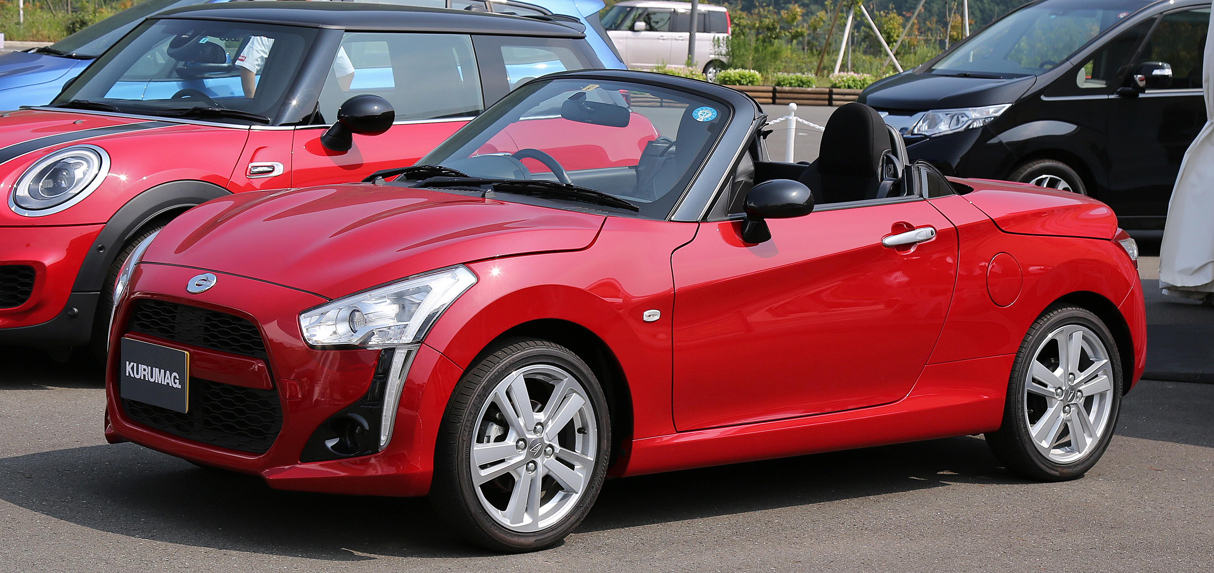 Daihatsu Copen Robe